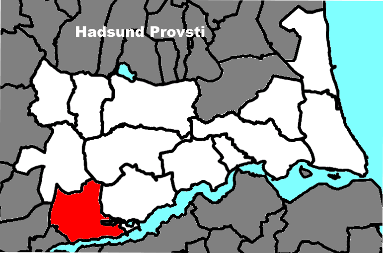 Sognets beliggenhed i Hadsund Provsti.